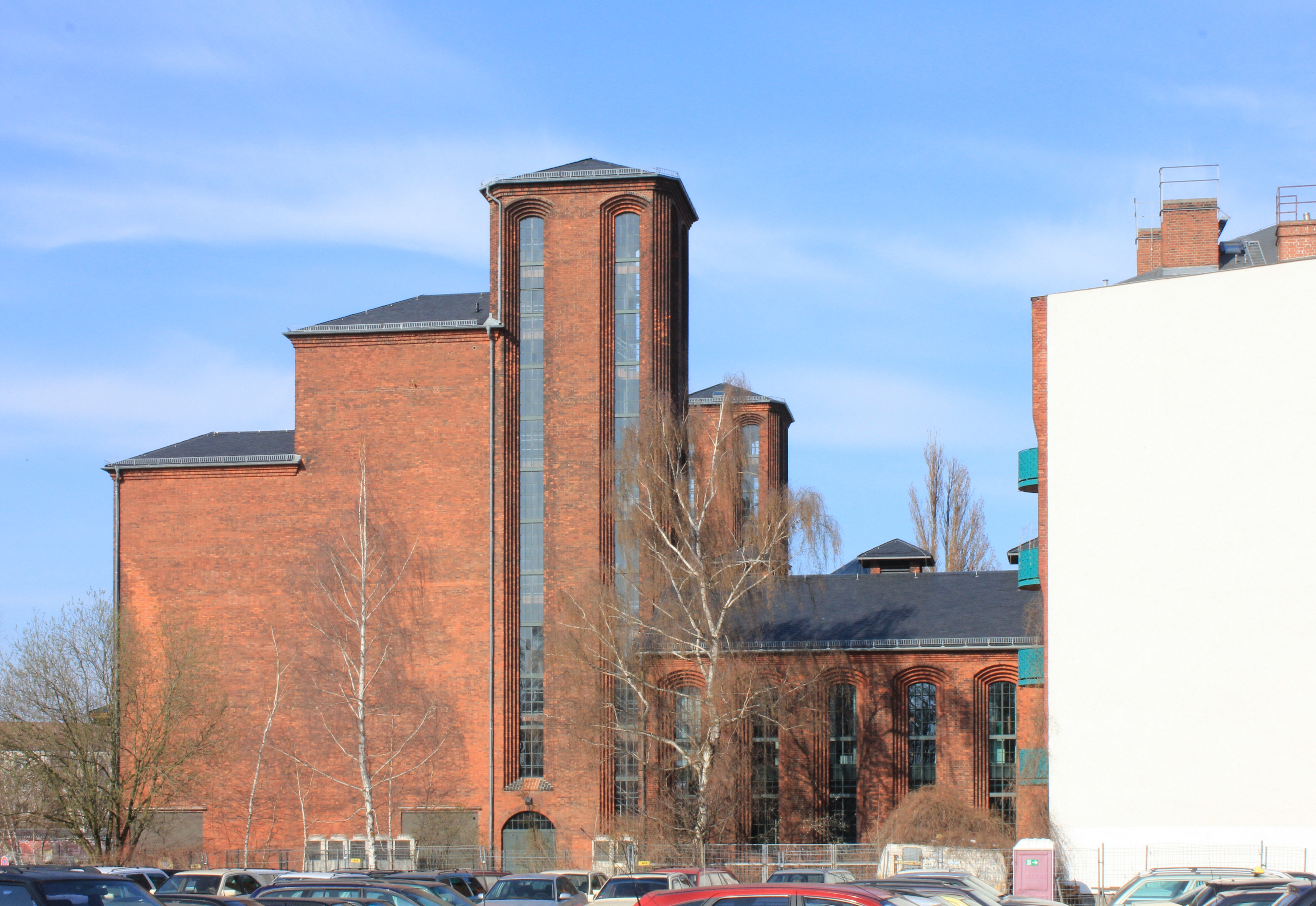 Umspannwerk Wilhelmsruh 1925-27 von Hans Heinrich Müller für die BEWAG